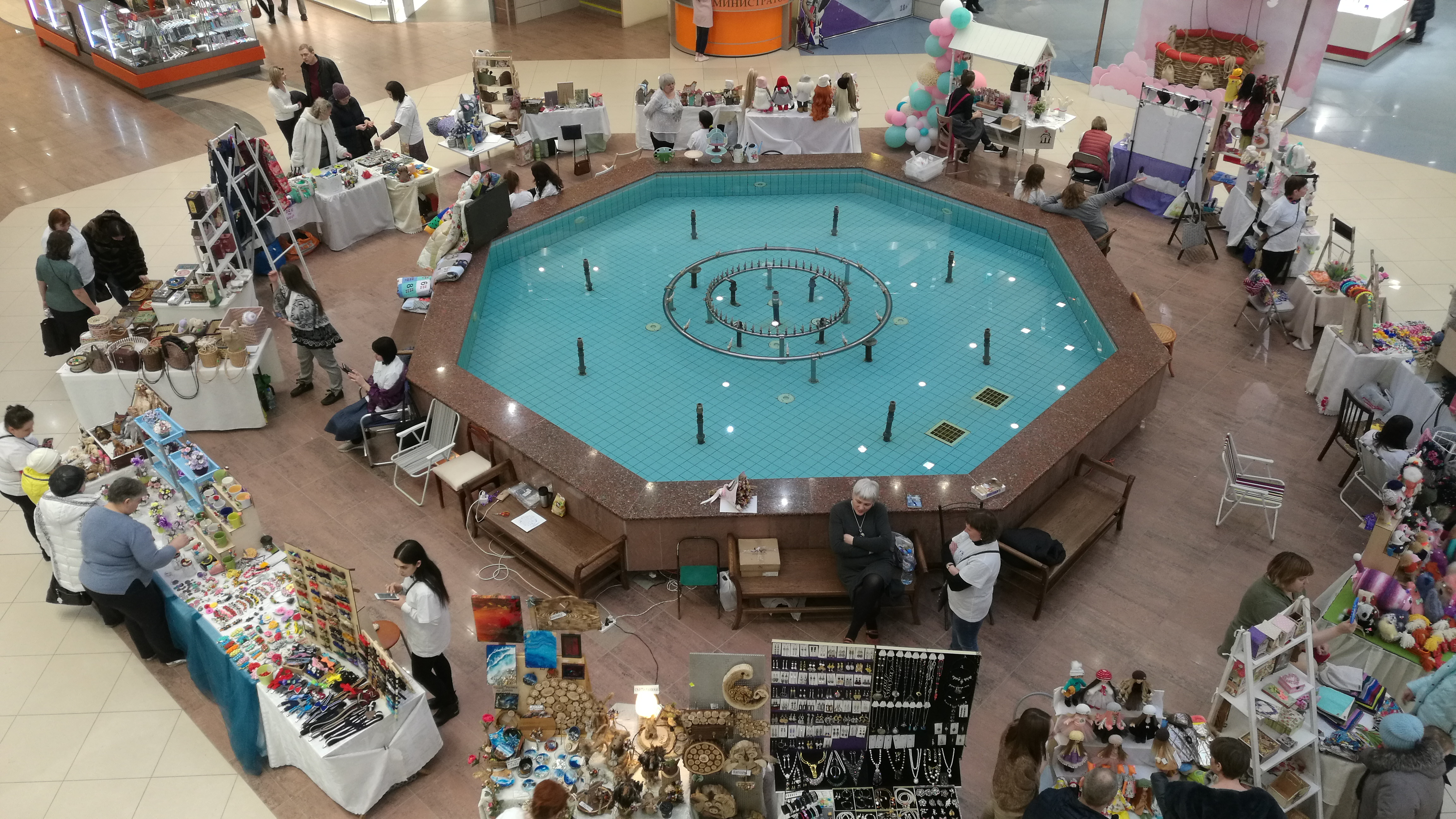 Artmetiista foiro en aĉetcentro Goodwin. Tjumeno, Rusio.